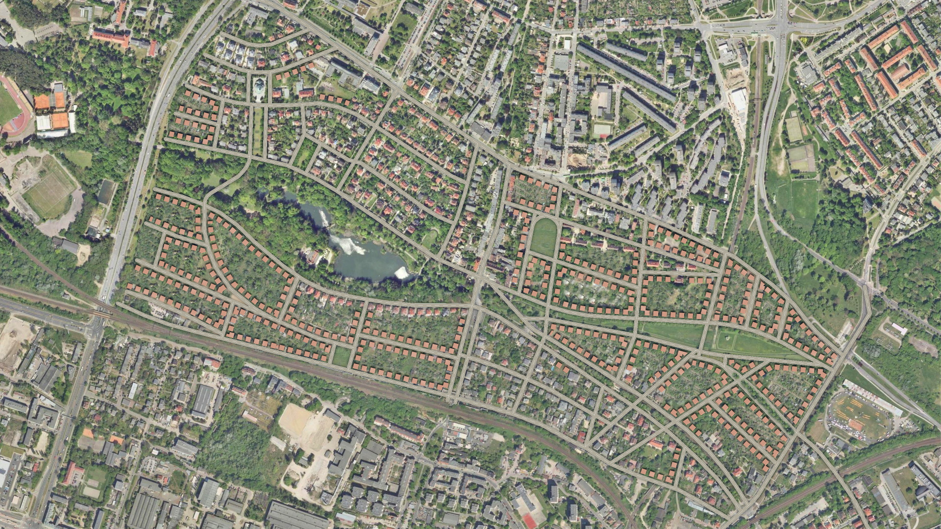 Docelowy plan Sołacza zgodnie z projektem Josepha Stubbena